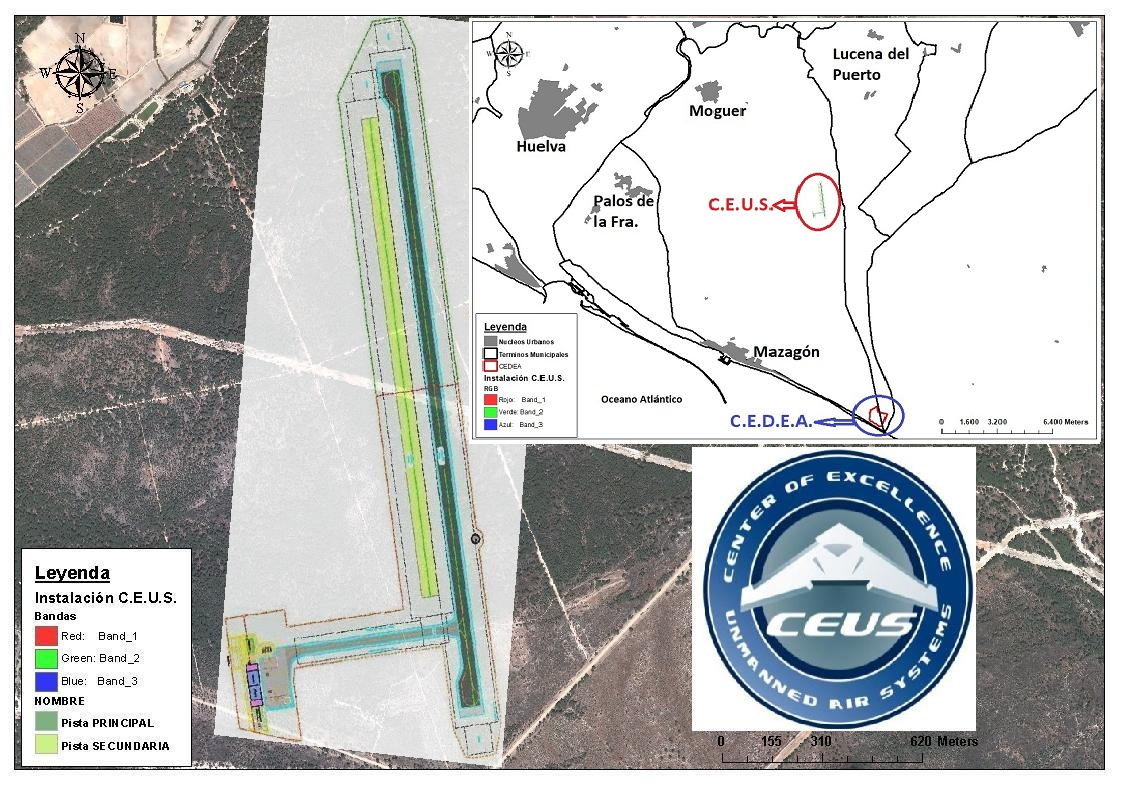 Plano del C.E.U.S. y C.E.D.E.A. con detalles de las instalaciones del C.E.U.S. con las dos pistas de aterrizaje y el resto de instalaciones.